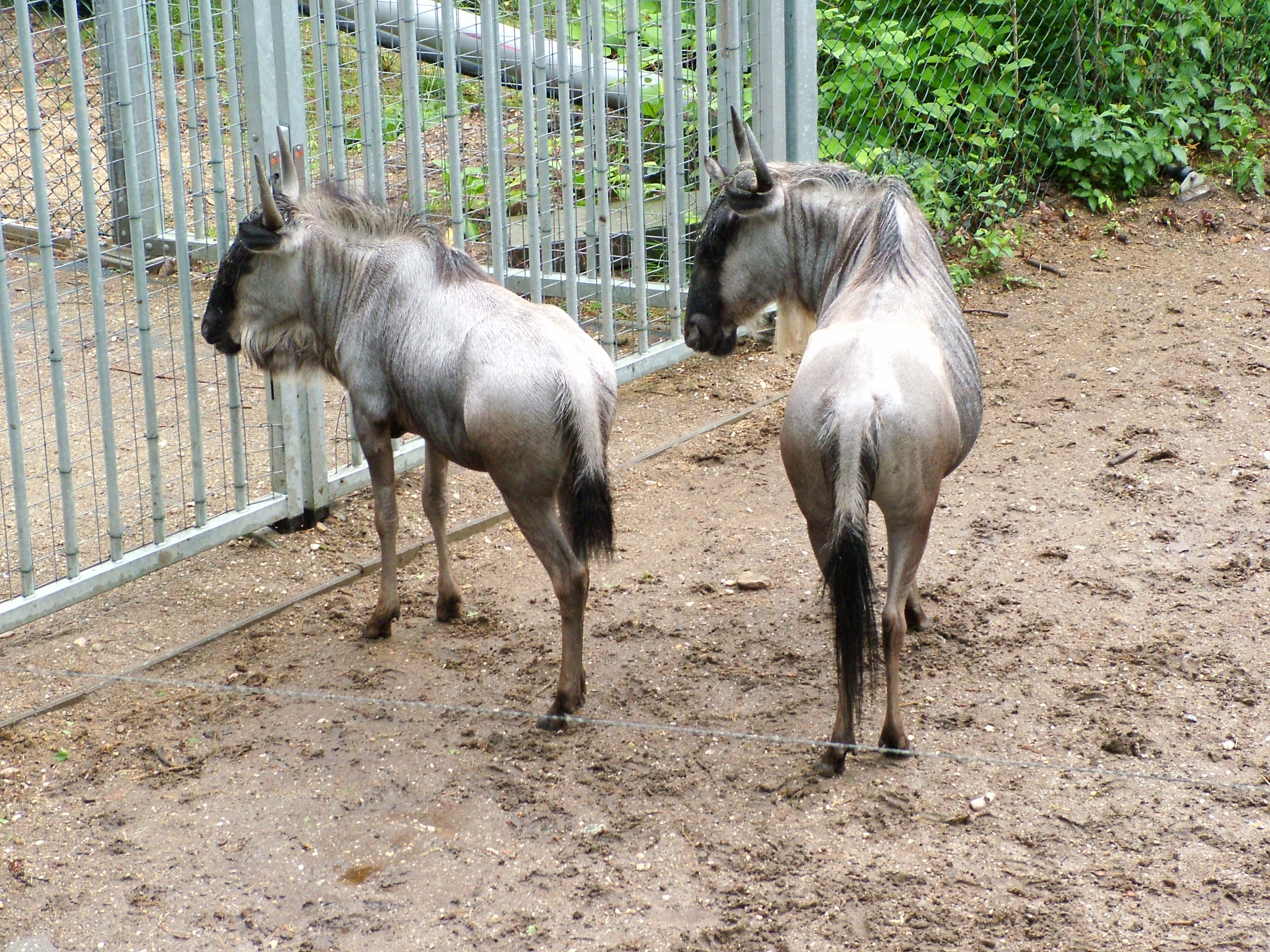 Burgers Zoo (Arnhem), Gnus